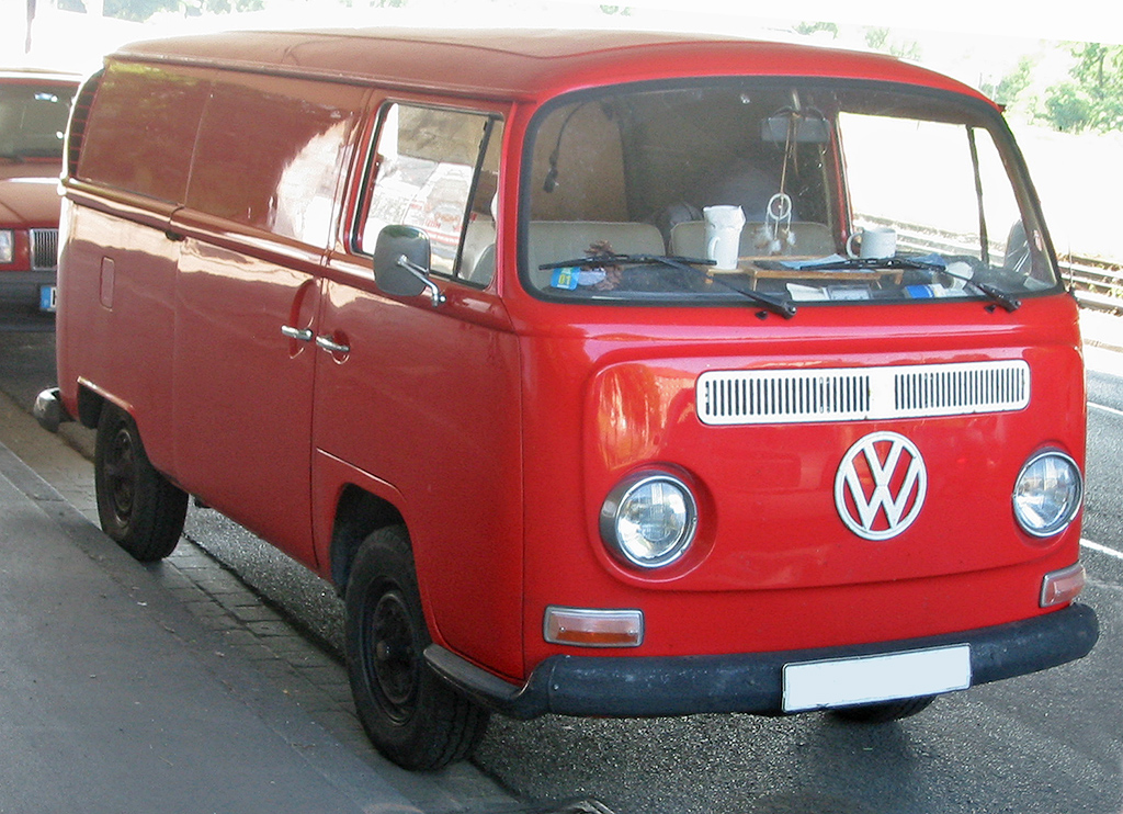 VW Transporter, T2a